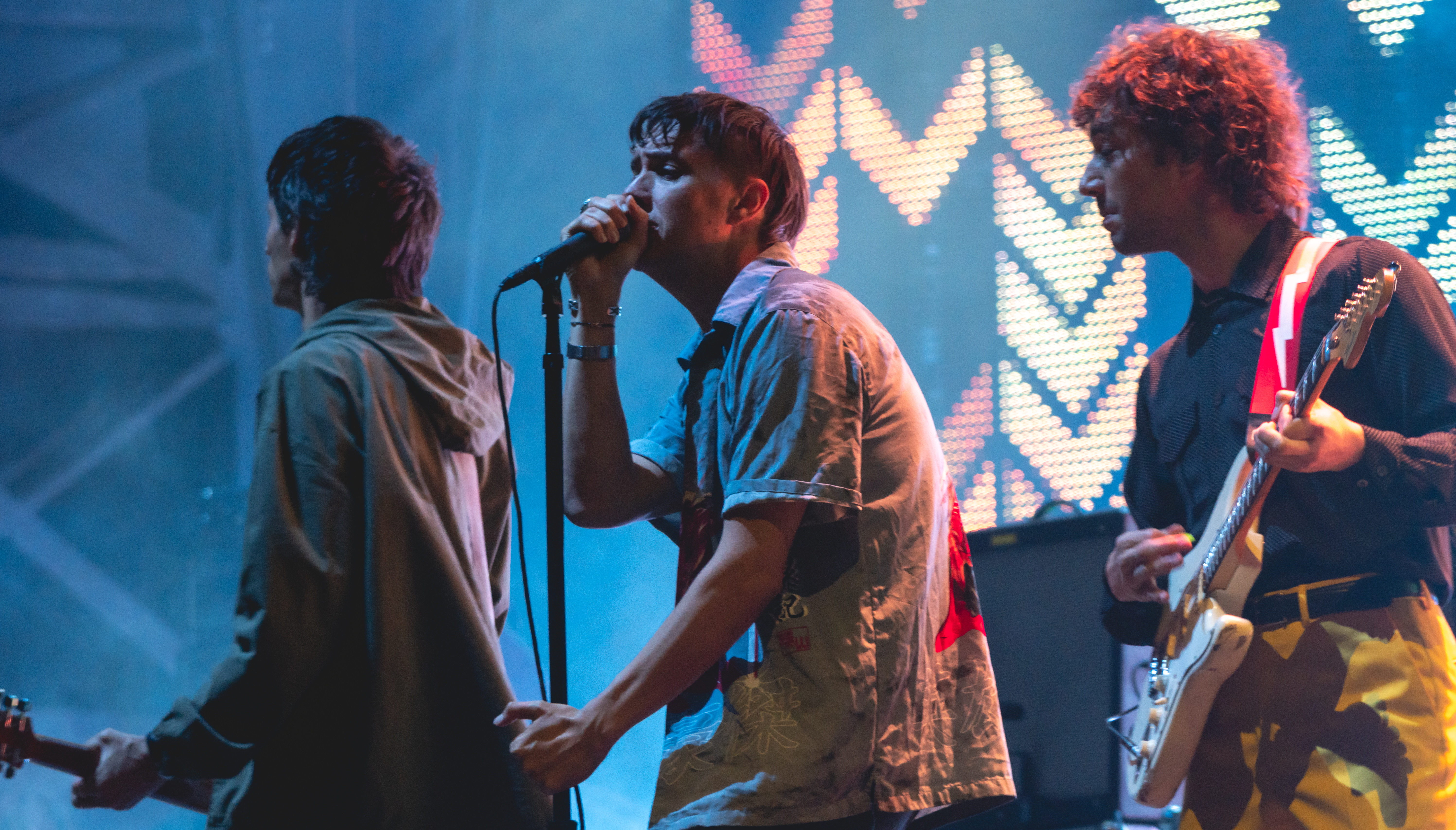 StrokesOhana270919-43